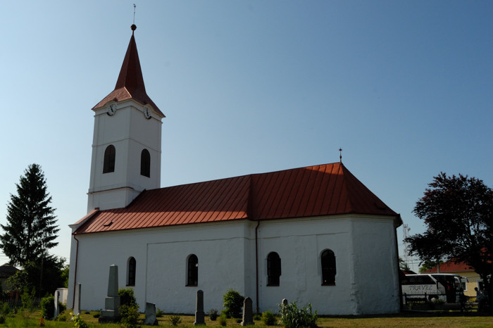 Tiszacsegei református templom (Hajdú-Bihar megye)